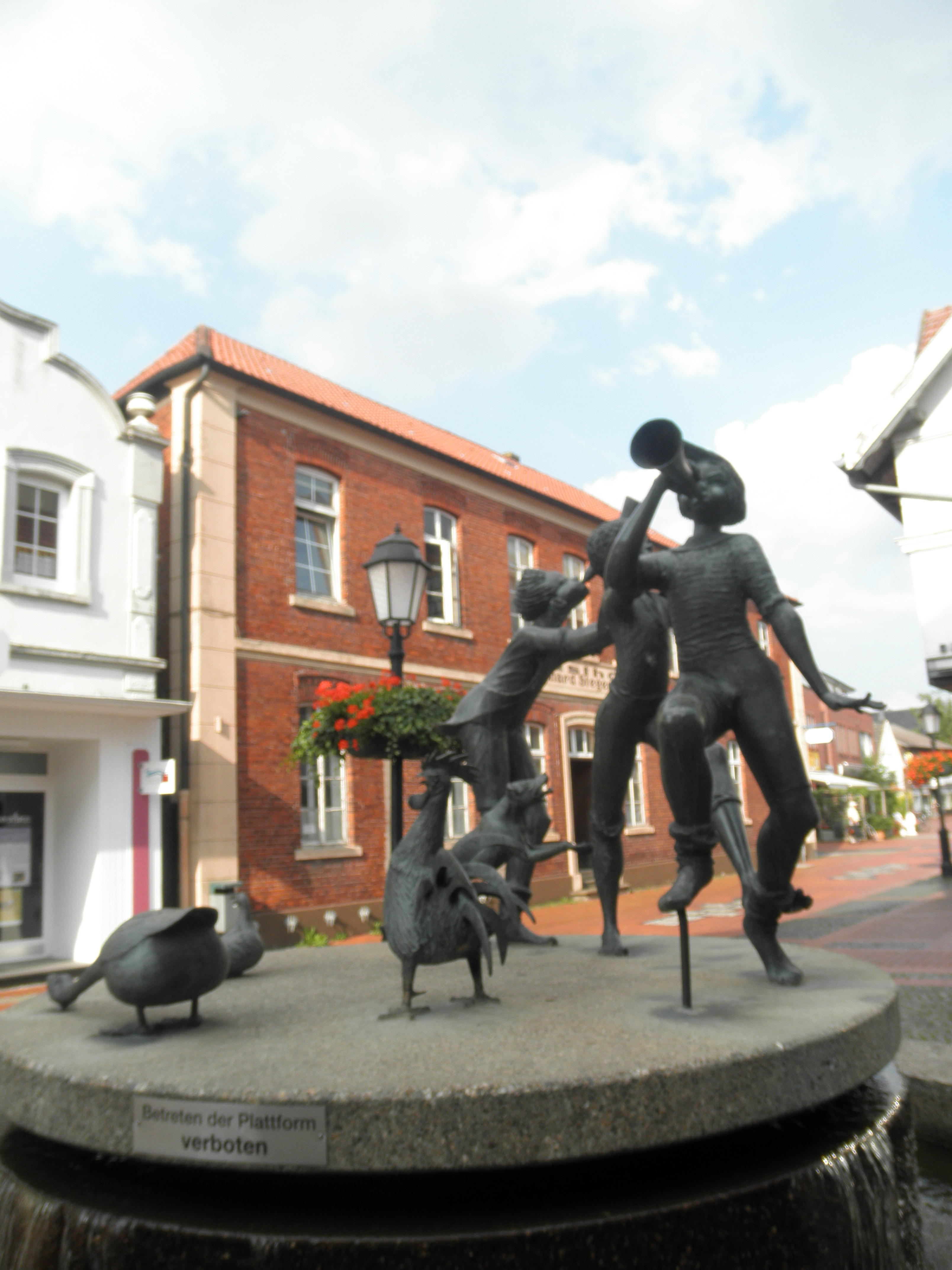 fontano "Adventsbrunnen" en Löningen, Germanio